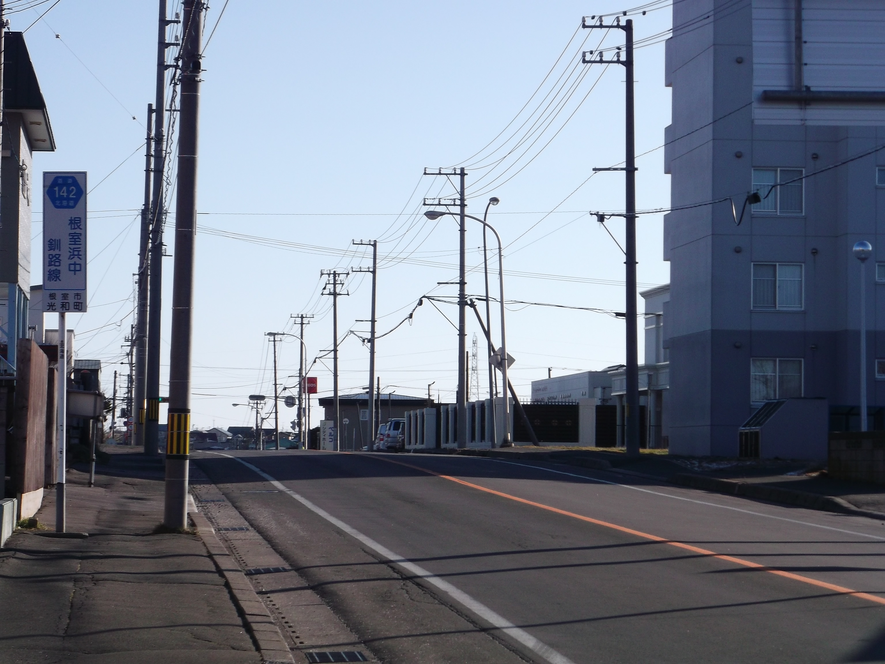 北海道道142号根室浜中釧路線起点付近